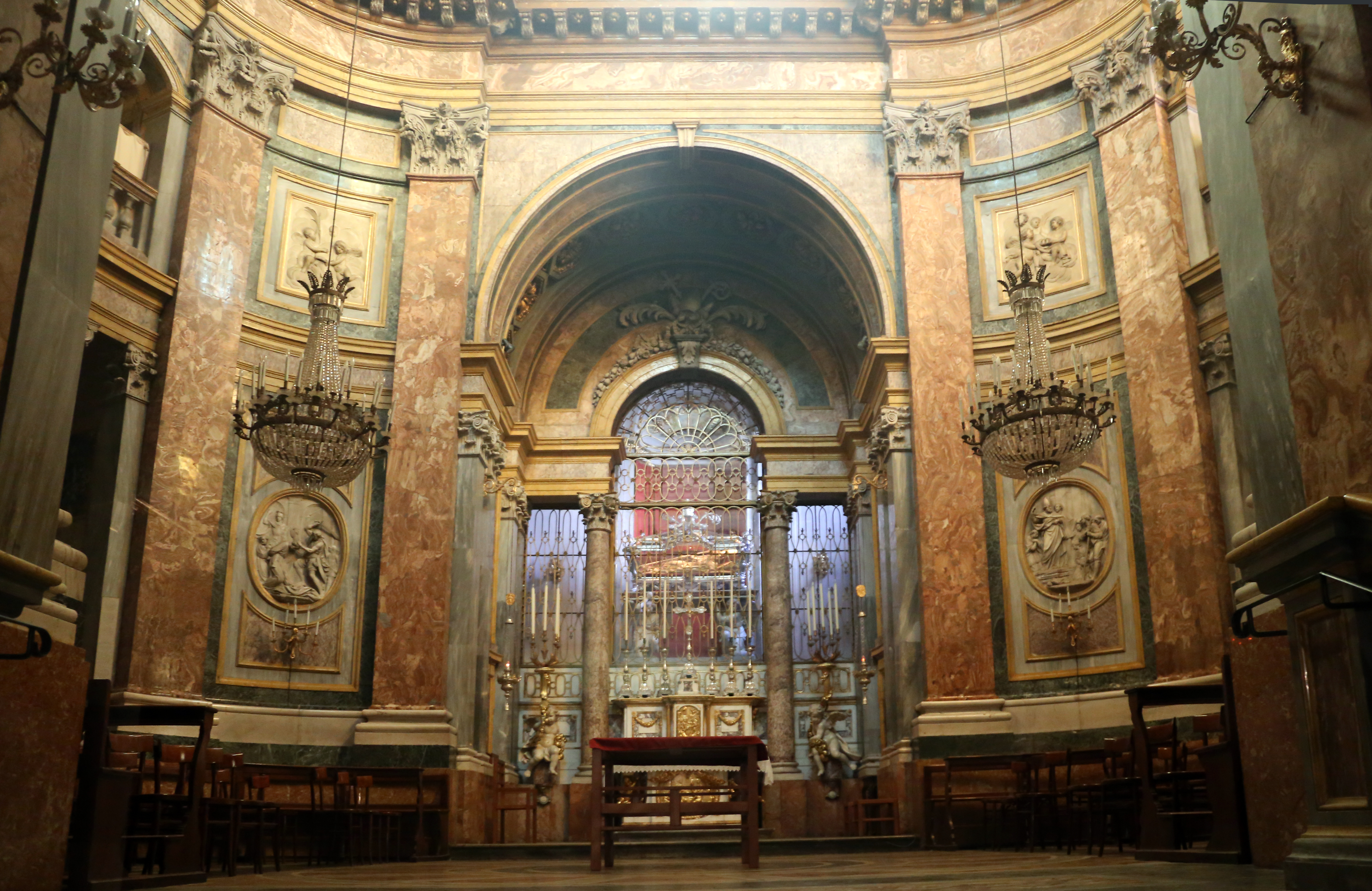 duomo di Sant'Evasio This is a photo of a monument which is part of cultural heritage of Italy.